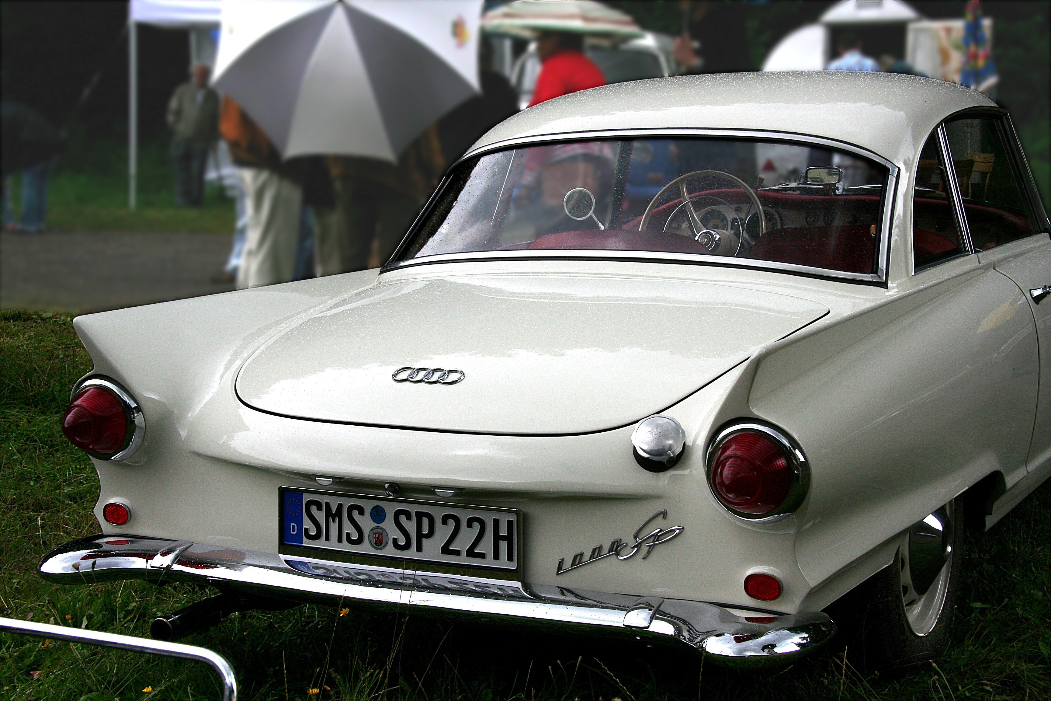 Auto Union 1000 Sp (Kennzeichen retuschiert)